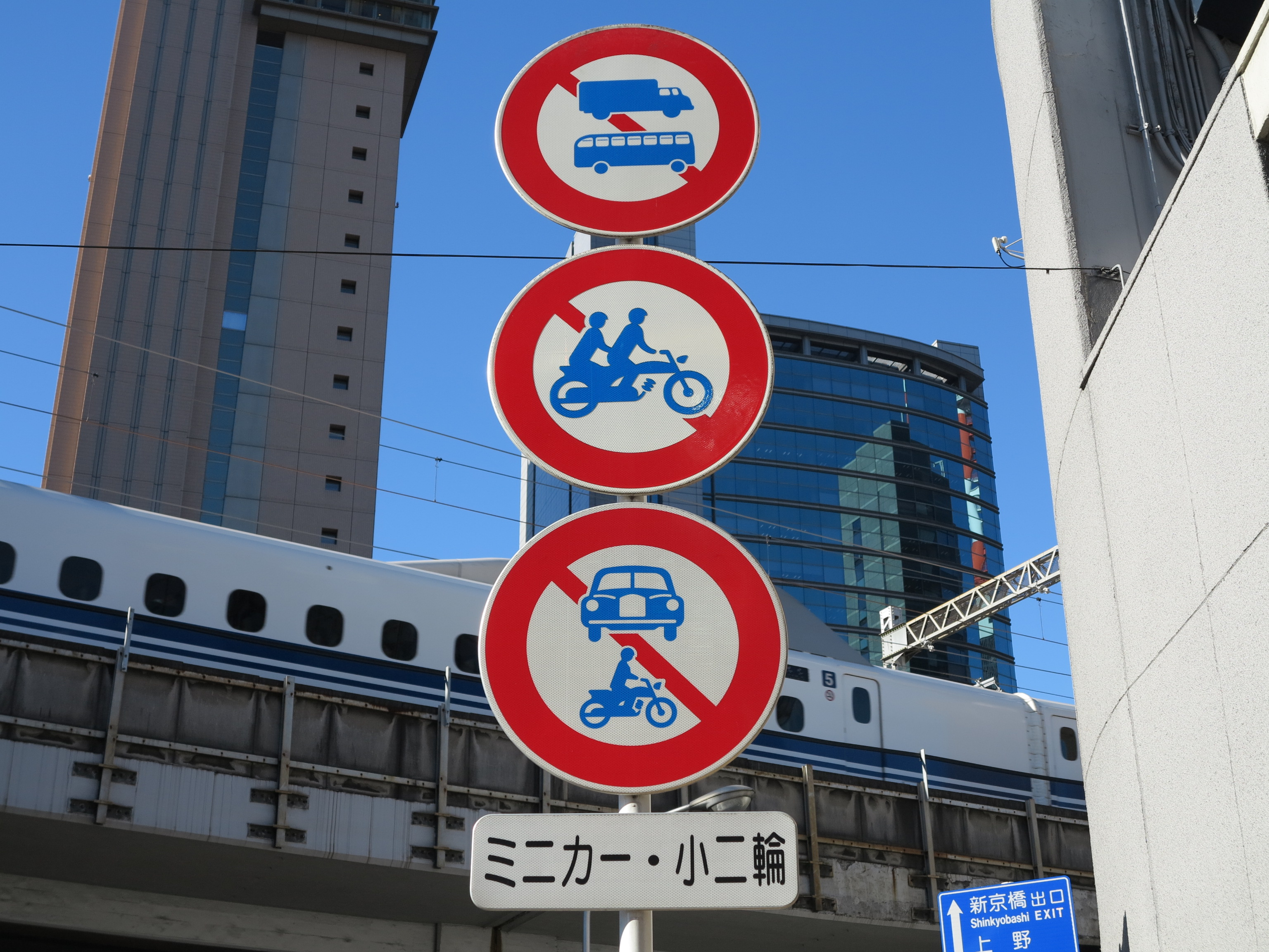 首都高KK線土橋入口の通行止め車両標識